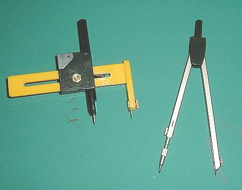 Source: Peng 15:15, 15 May 2005 (UTC) selbst fotografiert am 24.9.04, GNU-fdl, Bild :einf. Zirkel + Schneidezirkel Lizent